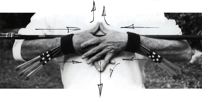 Kata-Sarbacana (Zen-Dojo-Sarbacana) Perceptions "TRANSPARADOXALES" (Transparadox)